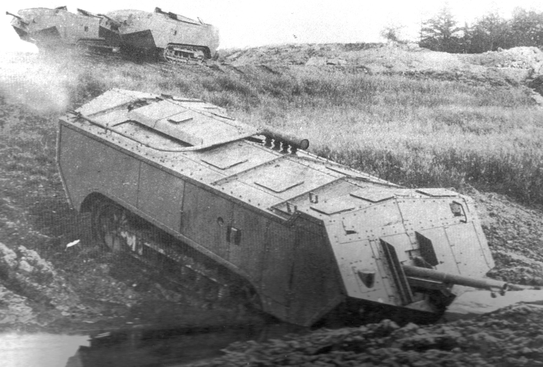 Digitale reproductie foto van St Chamond tank van het late type op oefening in 1918